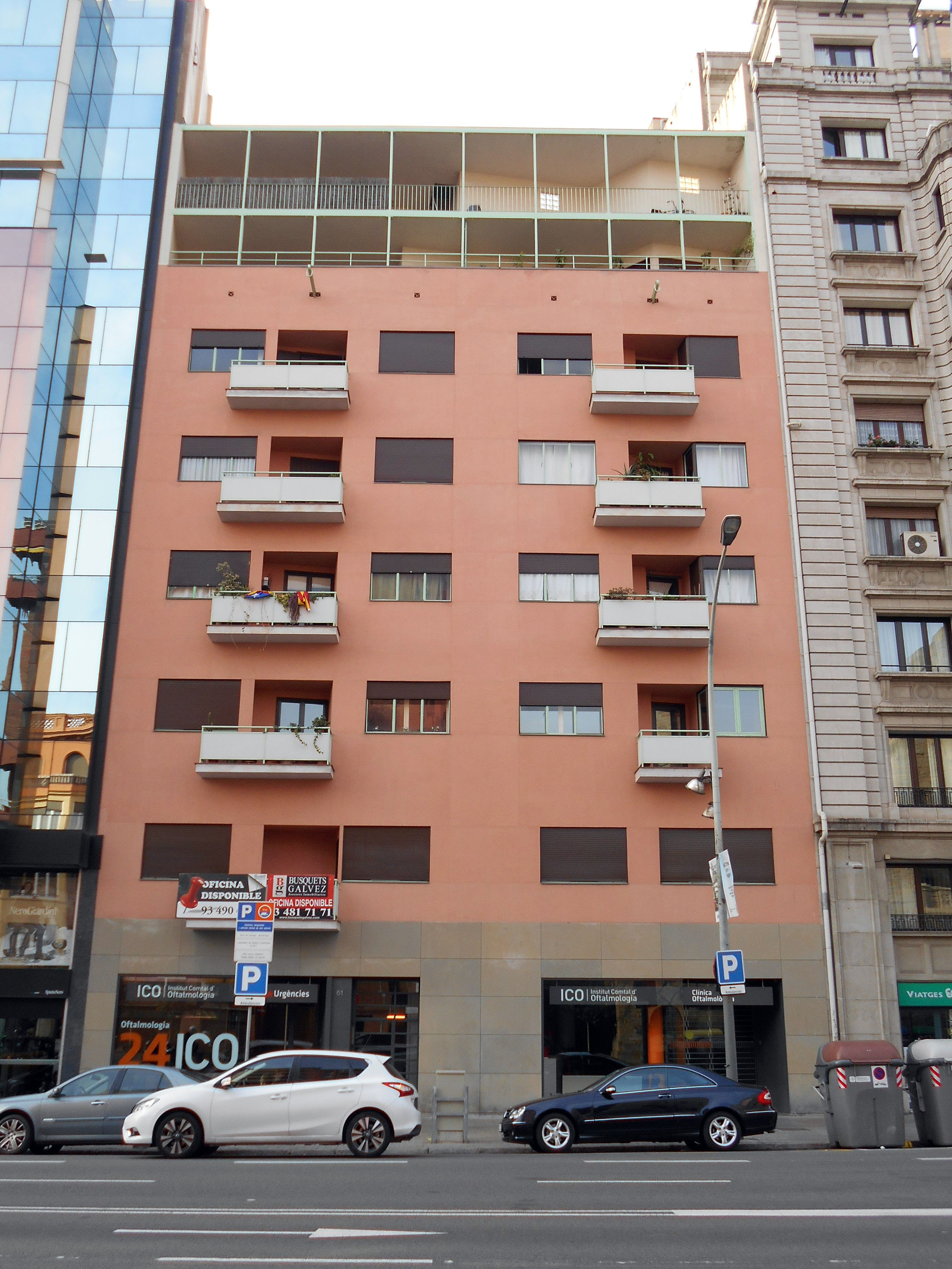 Edificio de viviendas de Via Augusta 61, Barcelona.